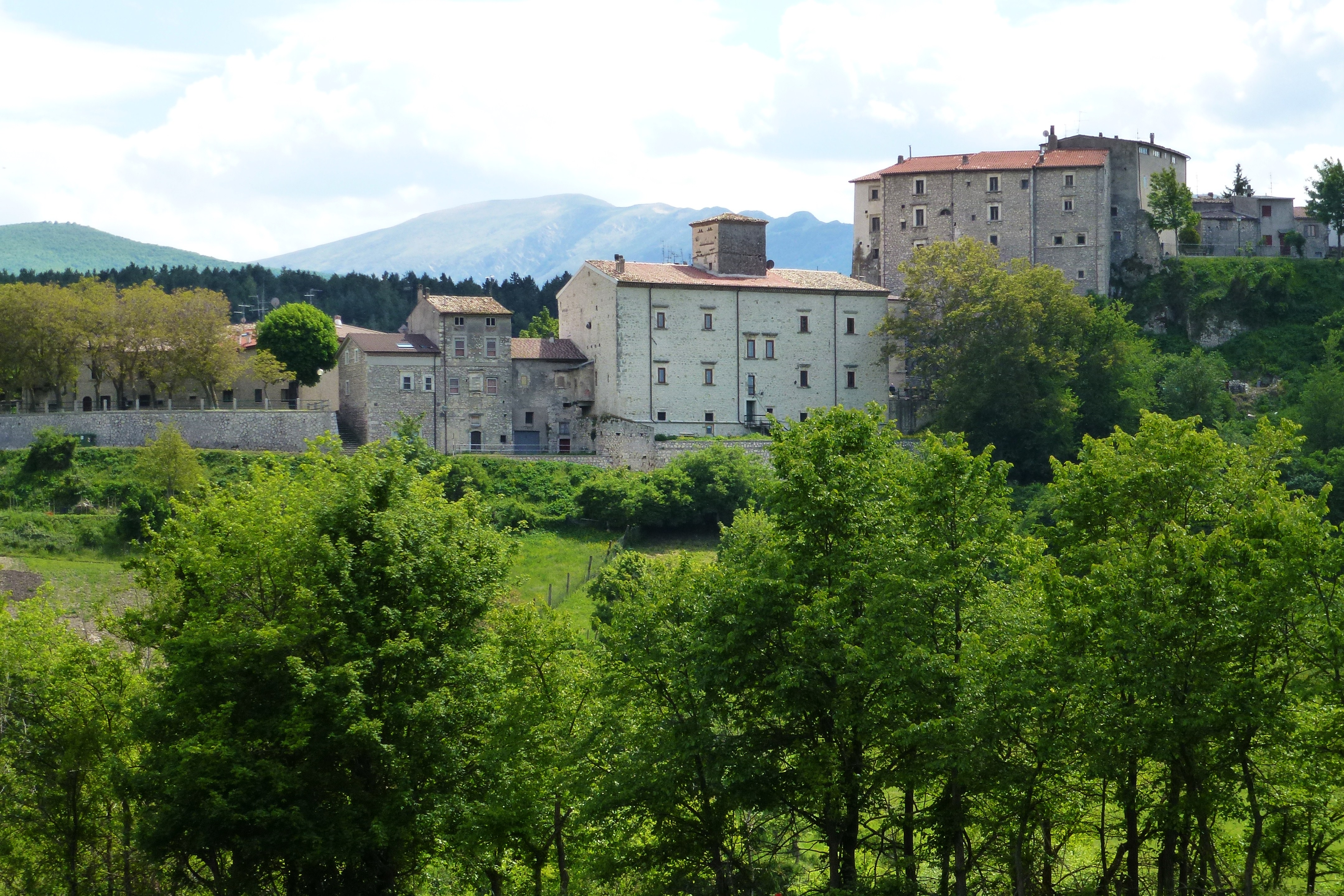 Campo di Giove